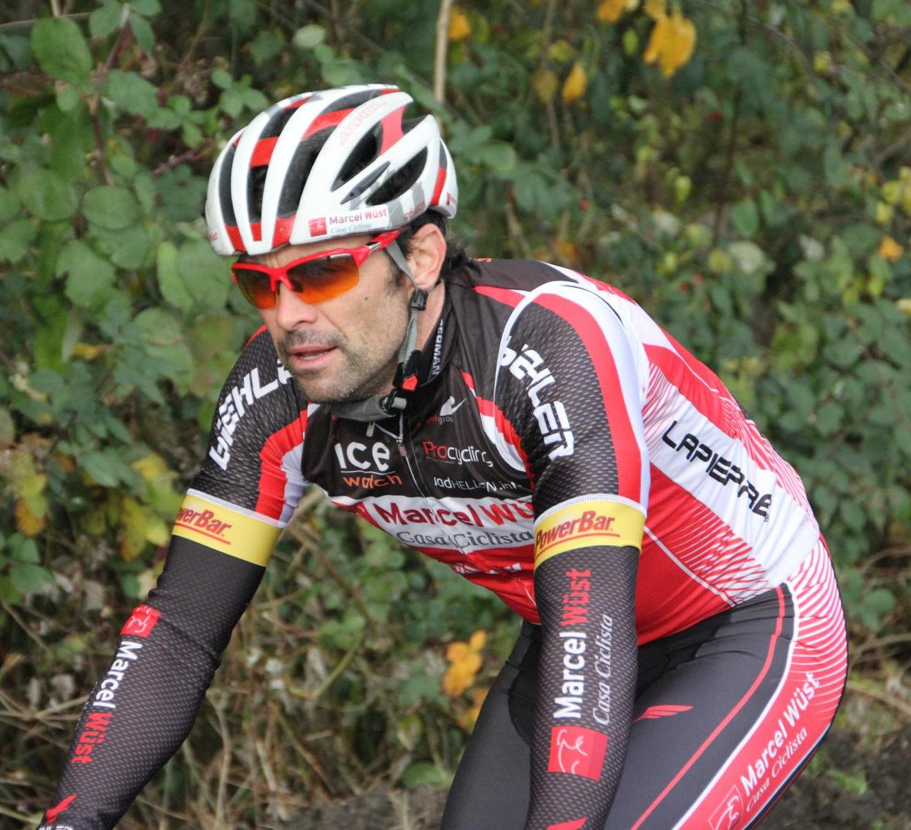 Marcel Wüst, deutscher Radsportler